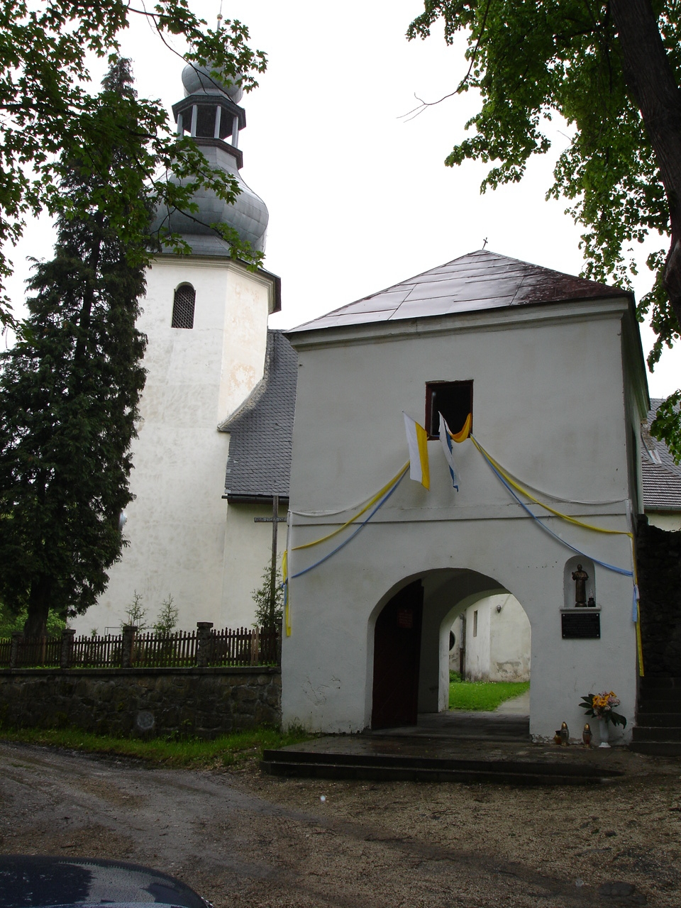 St.-Nikolaus-Kirche von Nowy Waliszów (Neuwaltersdorf) im Powiat Kłodzki in Polen